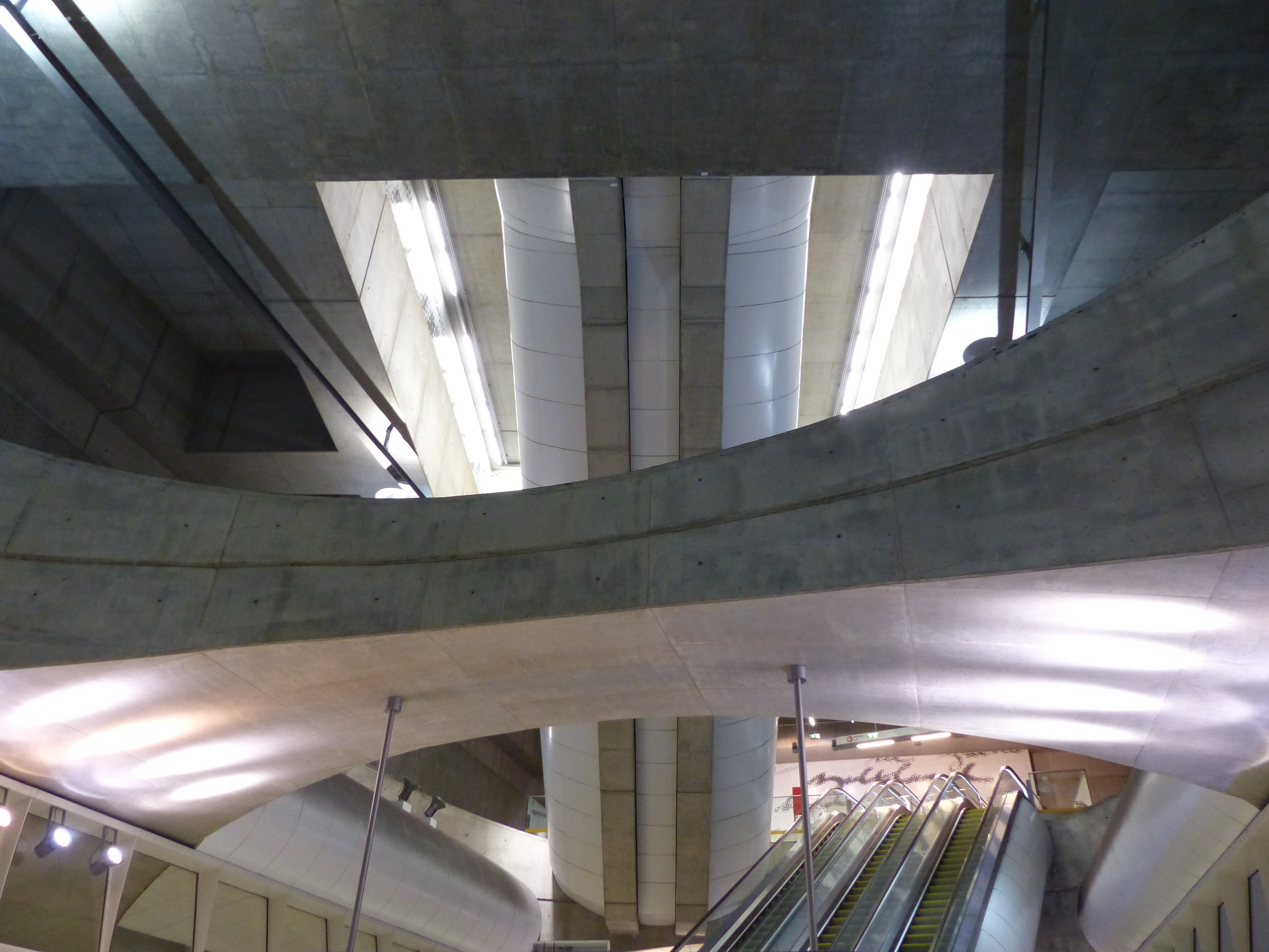 Látszóbeton. A felvétel 2017. április 26-án készült a Kálvin téri metróállomáson, Budapesten.